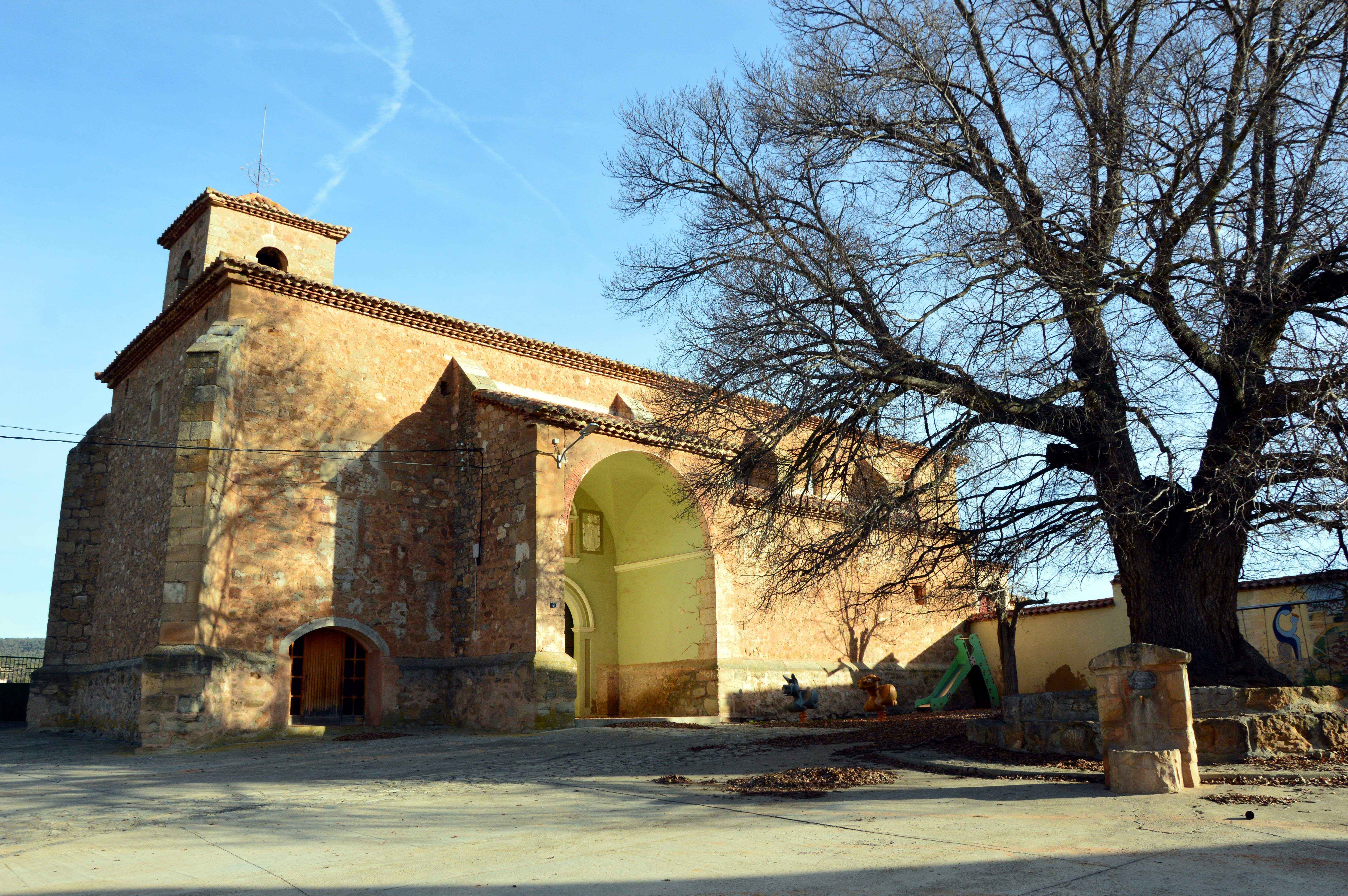 Vista general (meridional) de la iglesia parroquia de San Fabián y San Sebastián, Alobras (Teruel), año 2017.